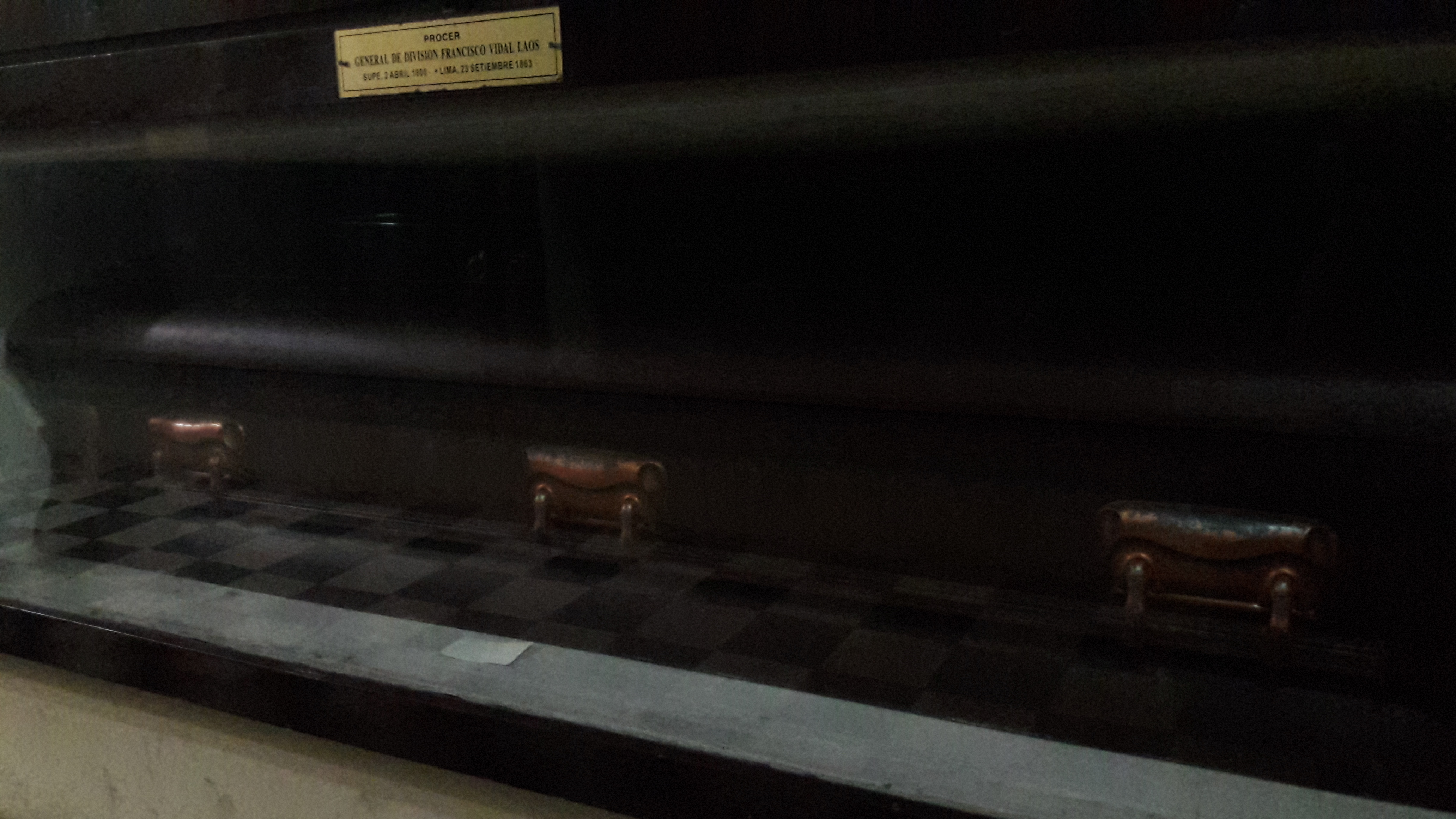 Tumba de Francisco de Vidal